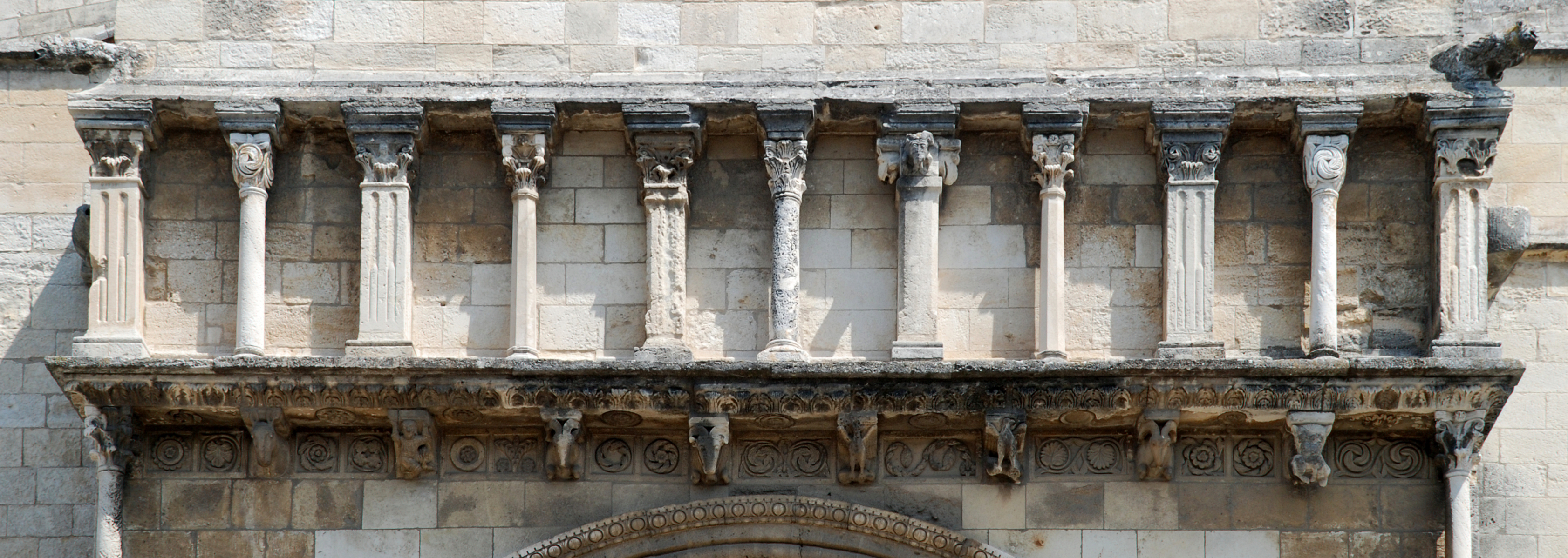 France - Provence - Tarascon - Église Sainte-Marthe de Tarascon